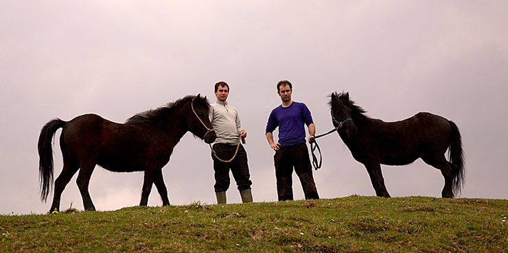 ZAPE elkarteko kideak beraien pottokekin